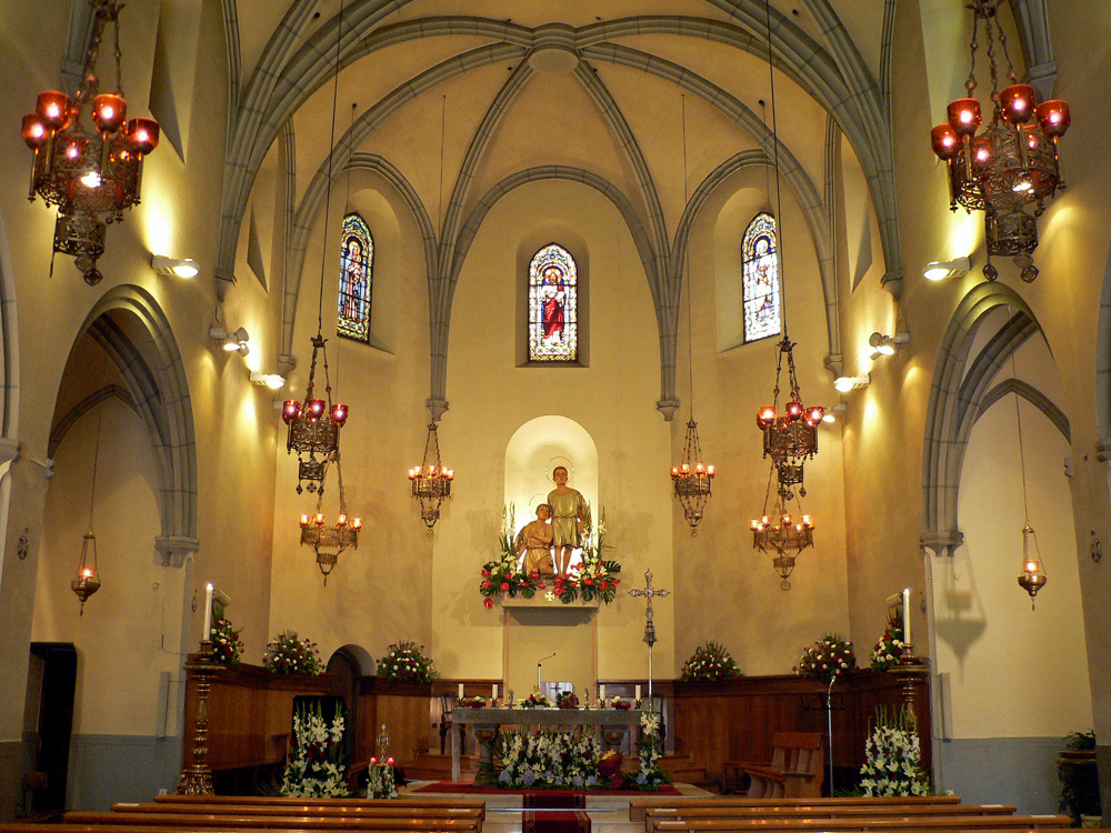 Sant Just Desvern (Comtat de Barcelona). Església parroquial dels Sants Just i Pastor. Interior